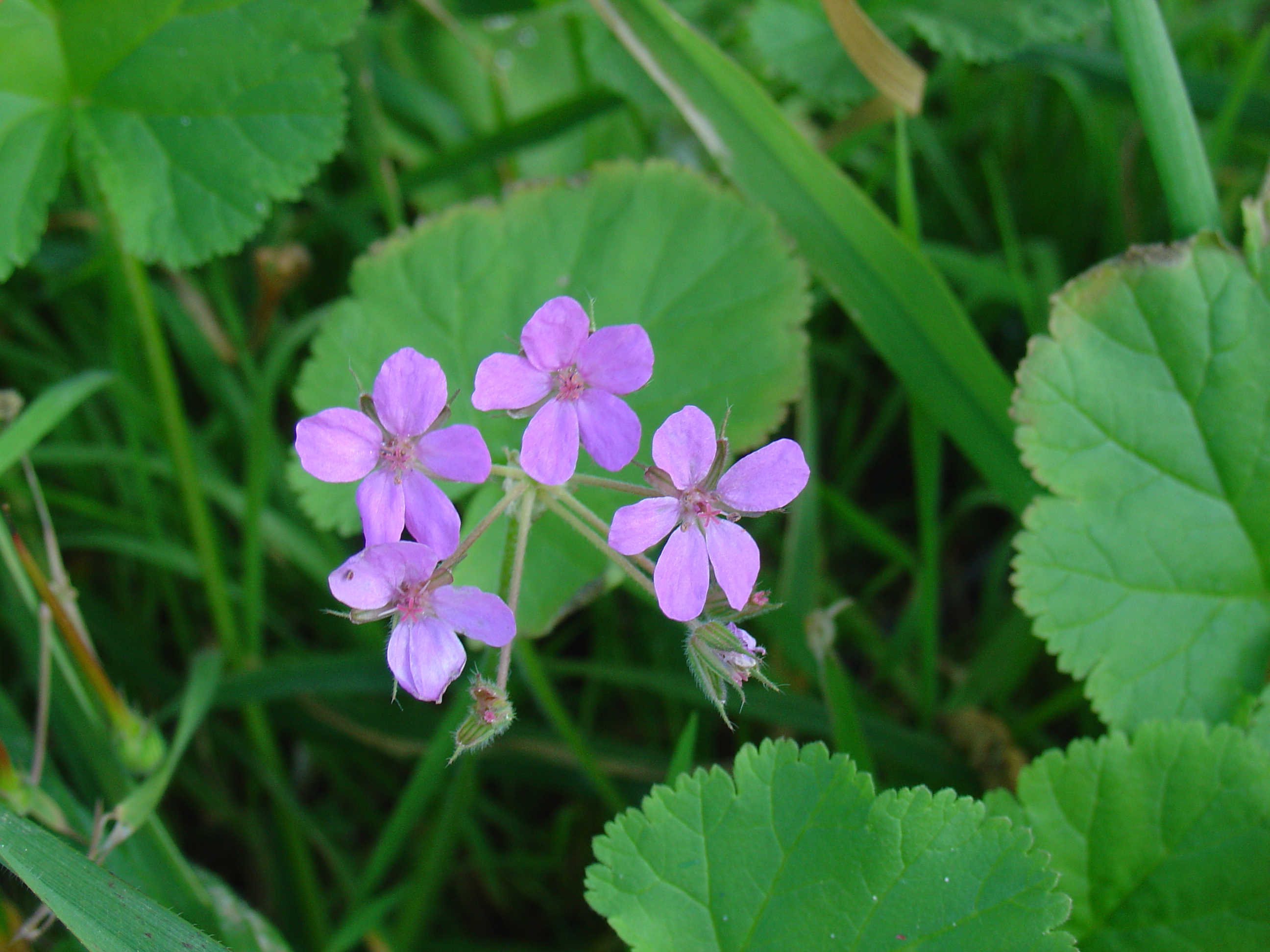 Erodium malacoides from Cabo de Palos, Murcia, Spain